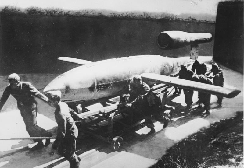 V1 vor dem Start Aus guter Deckung wird "V1" an die Abschußstelle gerollt. Der Start erfolgt durch eine Pressluftanlage. Mit Hilfe eines Fernlenkverfahrens trifft die "V1" das befohlene Ziel. Die gleichbleibend hohe Geschwindigkeit, die von keinem Feindjäger erreicht wird, erhält "V1" von einem Raketenantrieb. Diese erste deutsche Vergeltungswaffe ist eine hervorragende Schöpfung unserer Luftrüstung.